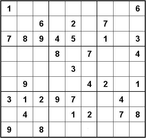 Sudoku